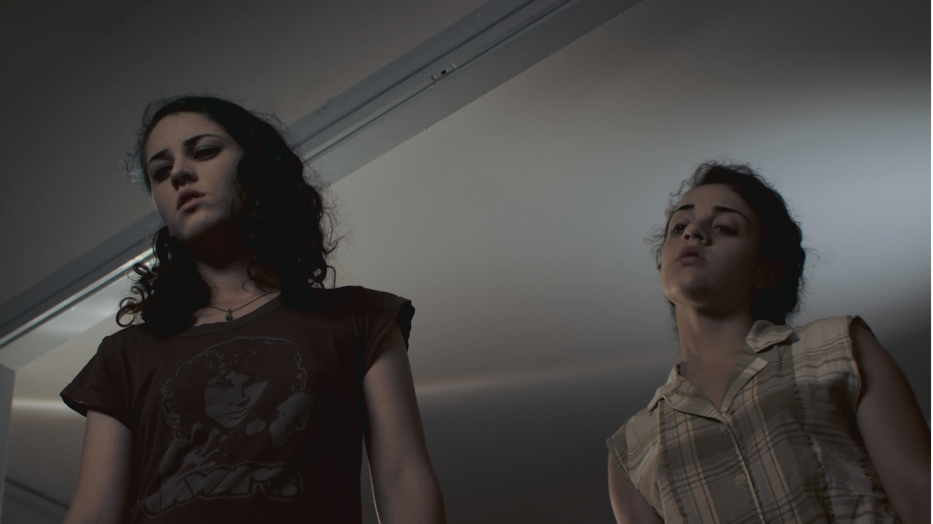 סצינה מהסרט ג'ו + בל